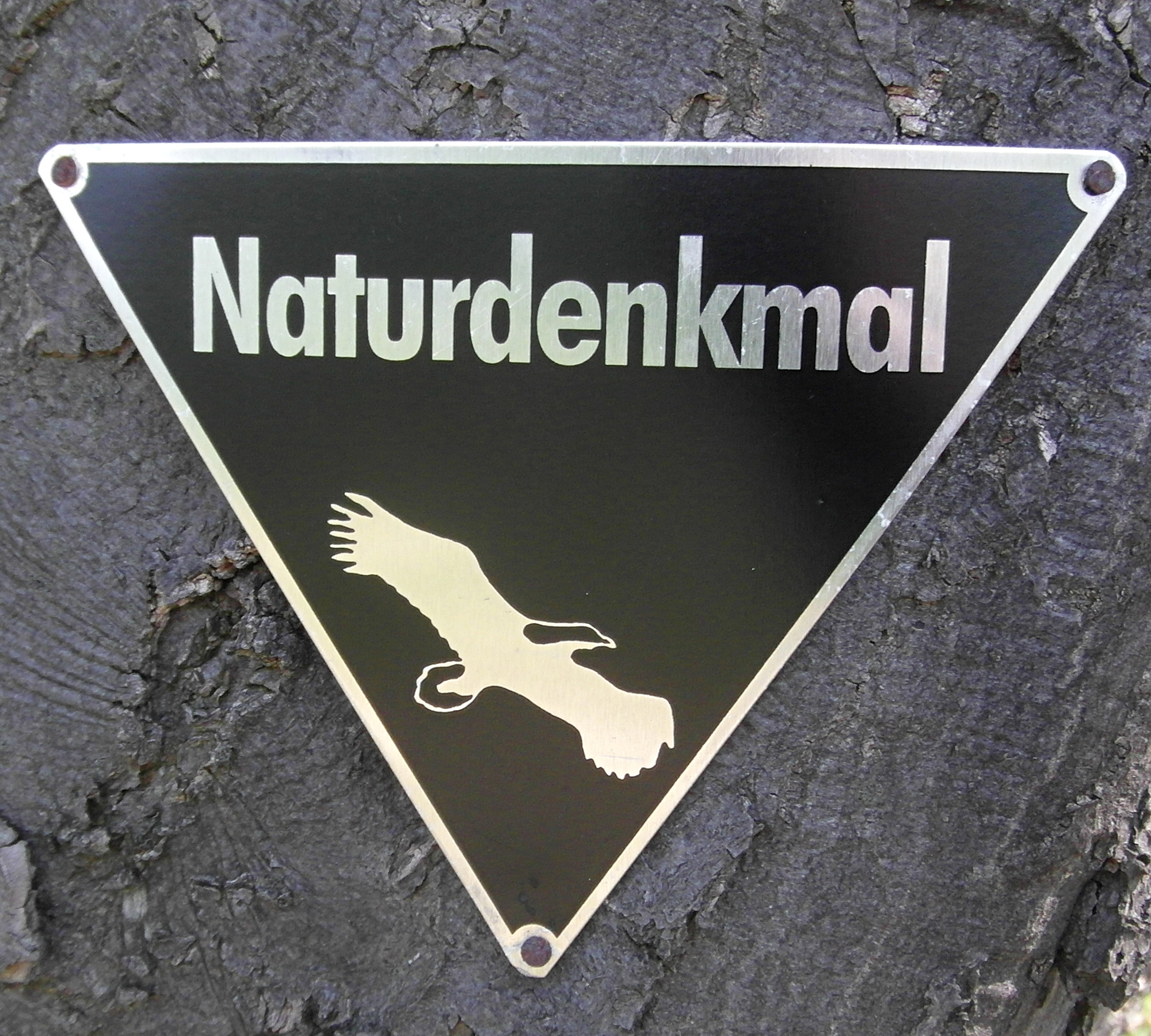 Markierungsplakette am Naturdenkmal ND-H 209 bei Redderse in der Region Hannover in Niedersachsen. In der Region häufig zu findende Kennzeichnungsart an geschützten Bäumen.